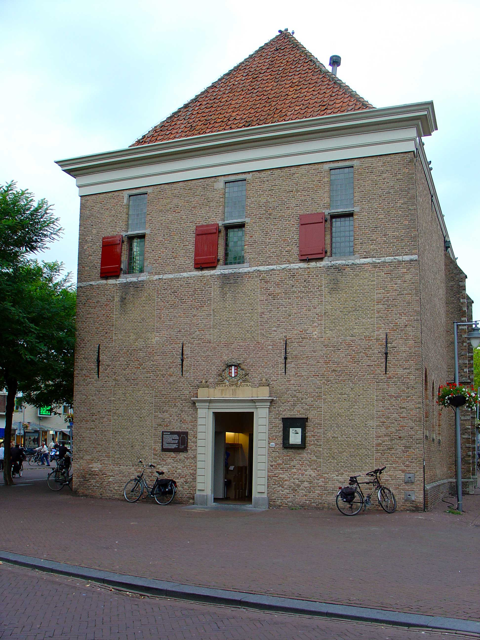 Agnietenkapel op de Nieuwe Markt te Gouda. AGNIETENKAPEL. Gotisch GEBOUW (midden XV) van drie traveeën met hoog dak en 3/8 sluiting. In de 17e eeuw tot Bank van Lening ingericht en verbouwd. De spitsboogvensters zijn gedicht en van kleine vensters (XVIII) voorzien. Slechts het venster in de as van het koor heeft nog resten van de tracering bewaard. De westgevel (XVIII) heeft kruiskozijnen, geblokte strekken boven de vensters, een poortje met stadswapen (Lod.XIV) en een geprofileerde, houten kroonlijst.